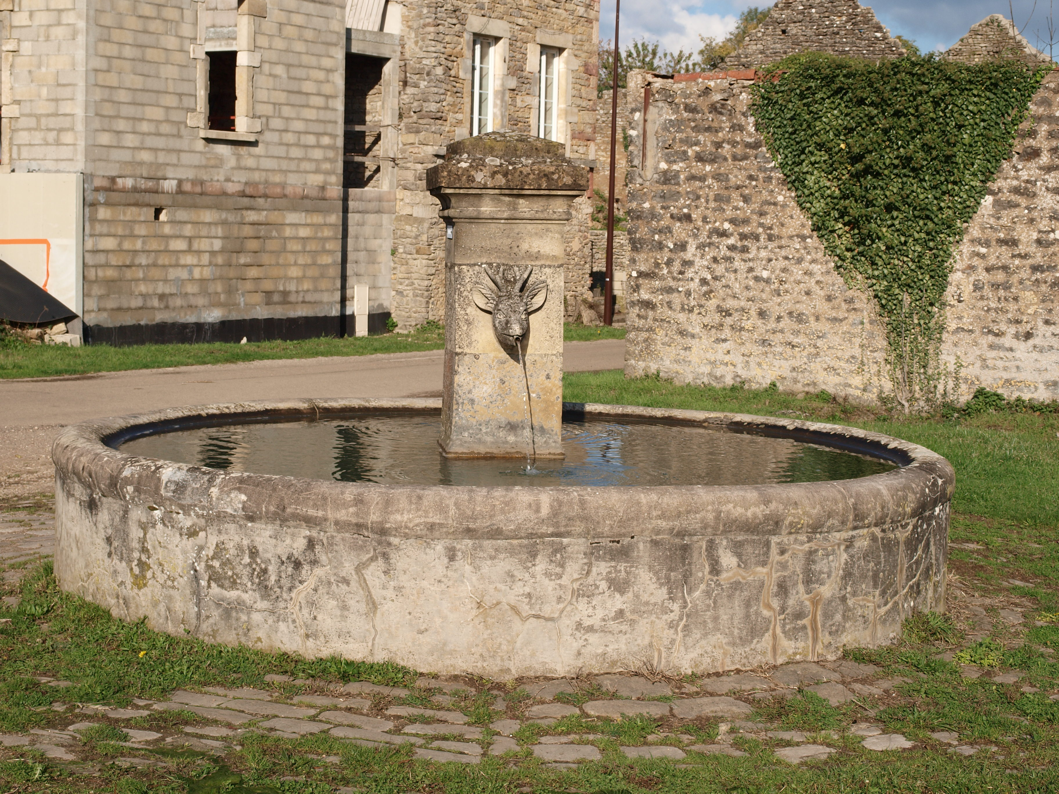 Saint-André-en-Terre-Plaine (Yonne, France) ; hameau de Chevannes ; fontaine publique